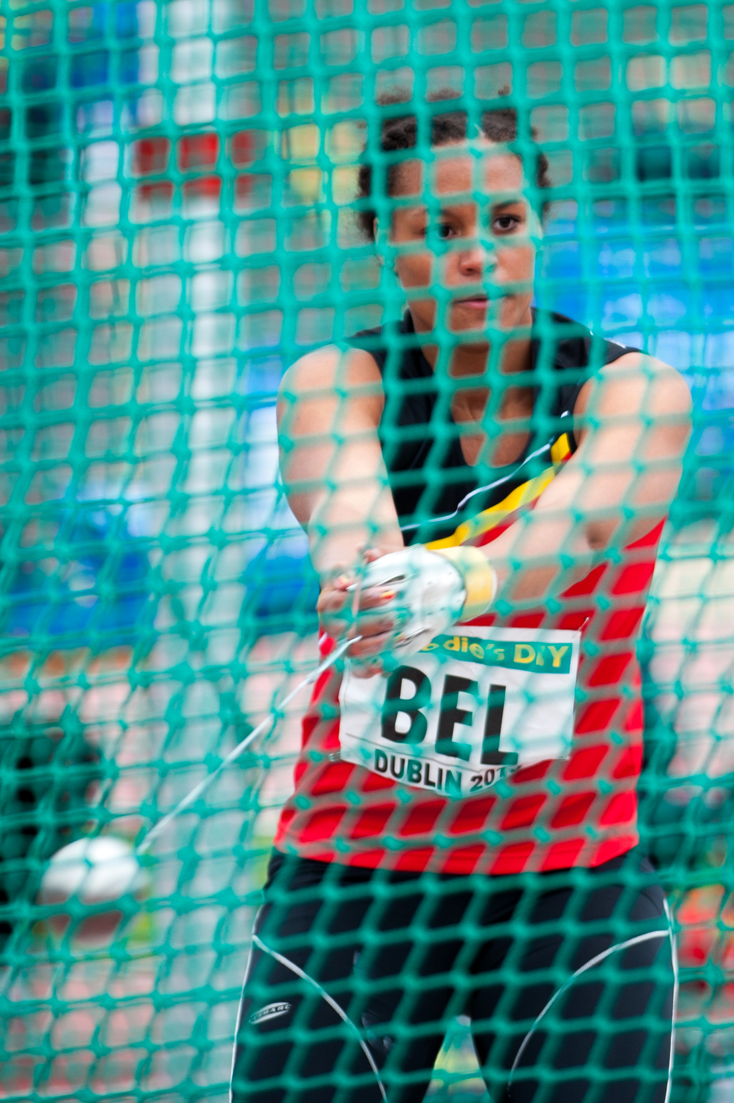 Jolien Boumkwo in actie tijdens het EK voor landenteams 2013 te Dublin.